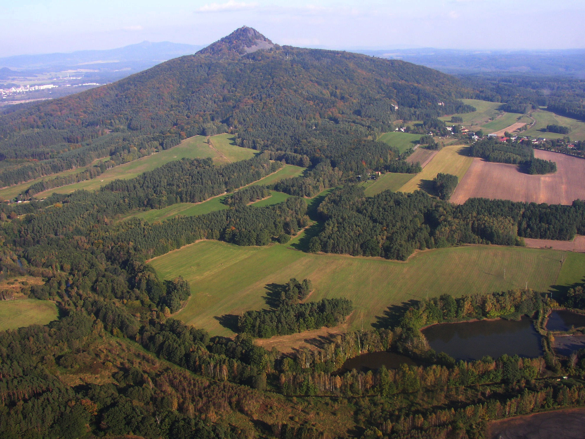 Luftbild von Berg Ralsko, Czech republic